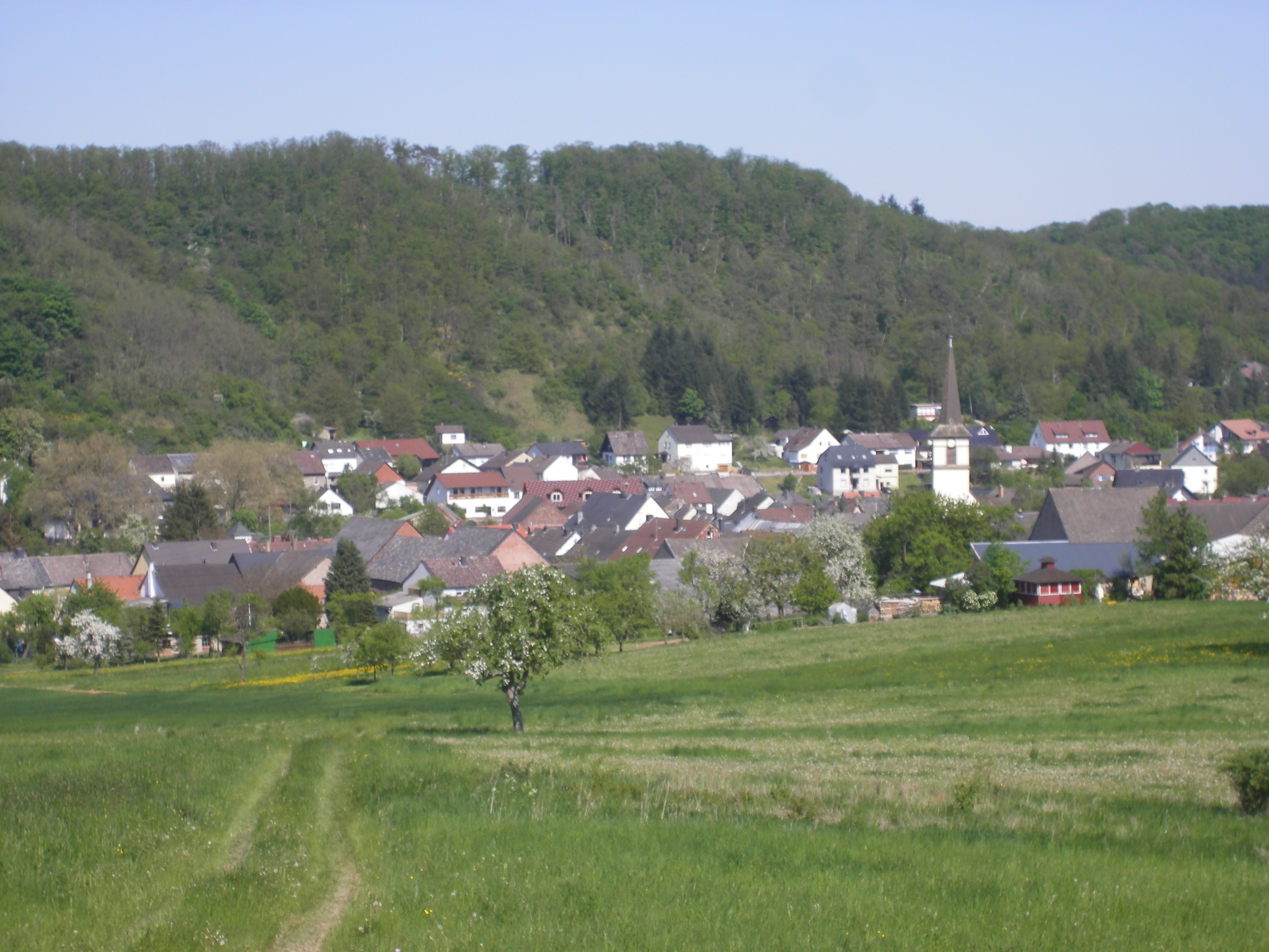 Becherbach, Rhineland-Palatinate